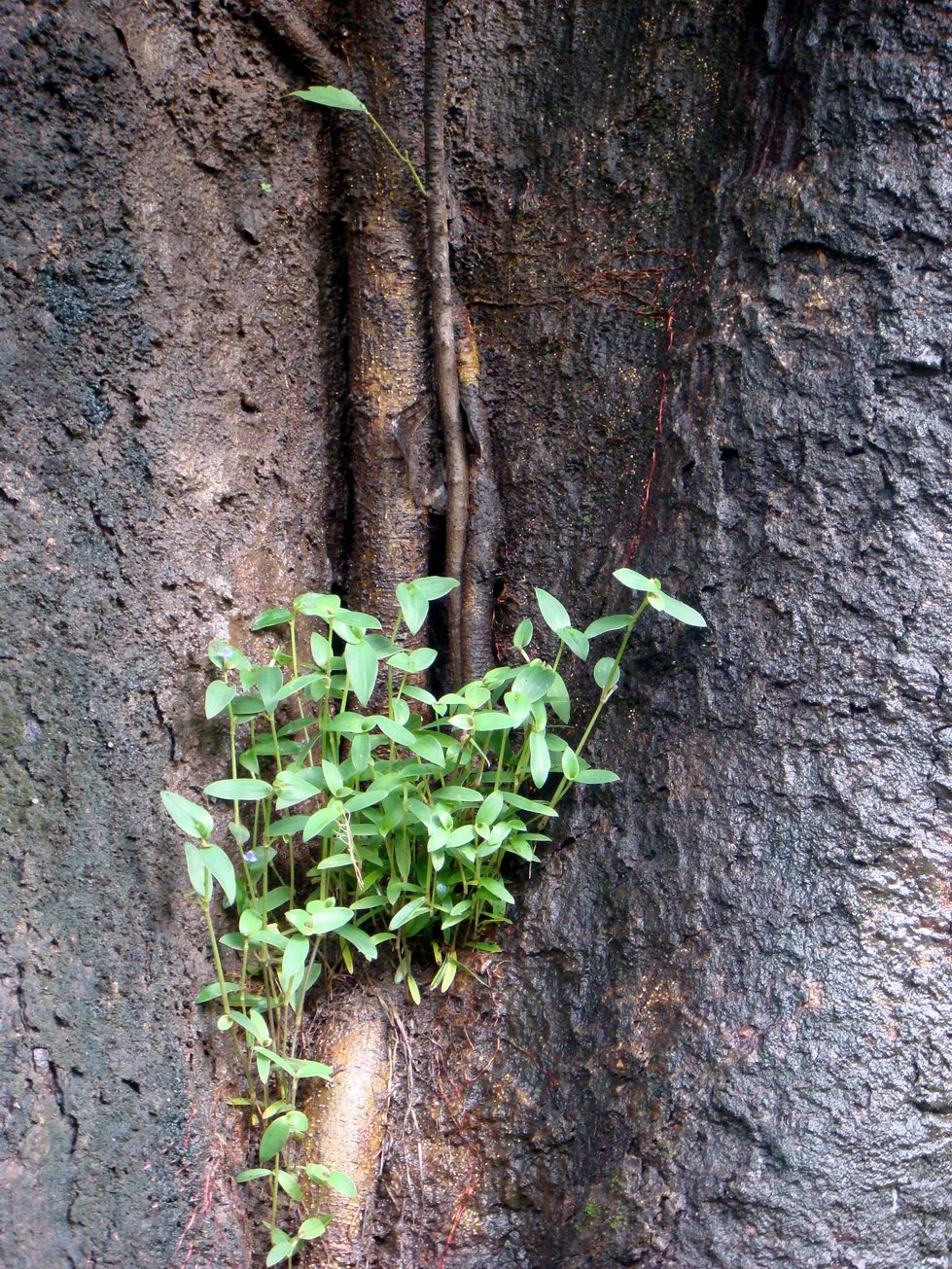 അരയല്മ്മരത്തിന്റെ പൊത്തുകളിലും മടക്കുകളിലും വളക്കുറുള്ള മണ്ണ് ശേഖരിക്പ്പെടുന്നുണ്ട്. ഈ മണ്ണ് ആലിനുമാത്രമല്ല മറ്റു ചെടികള്‍ക്കും വളം നല്‍കുന്നുണ്ട്